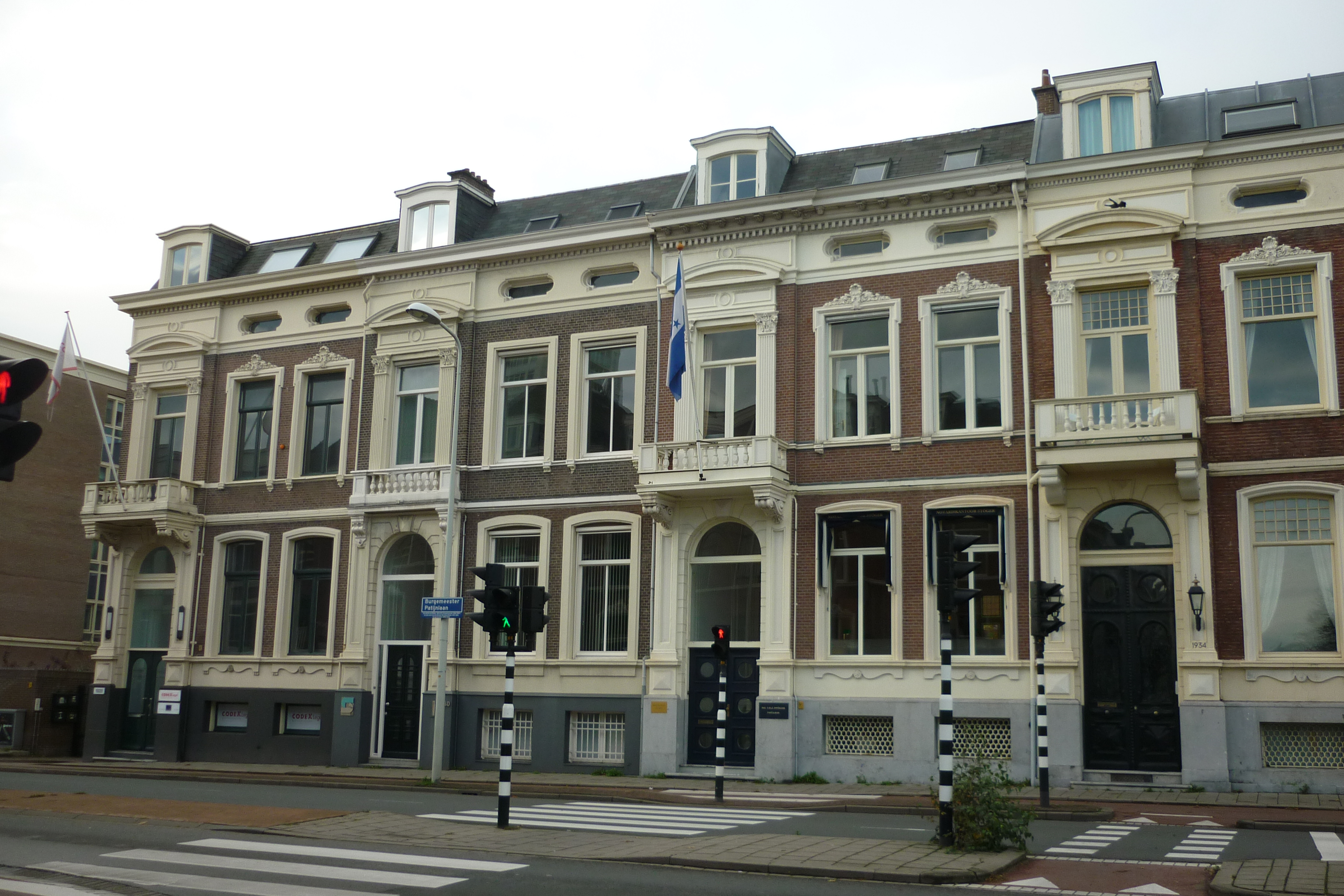 Den Haag, Patijnlaan hoek Bankastraat